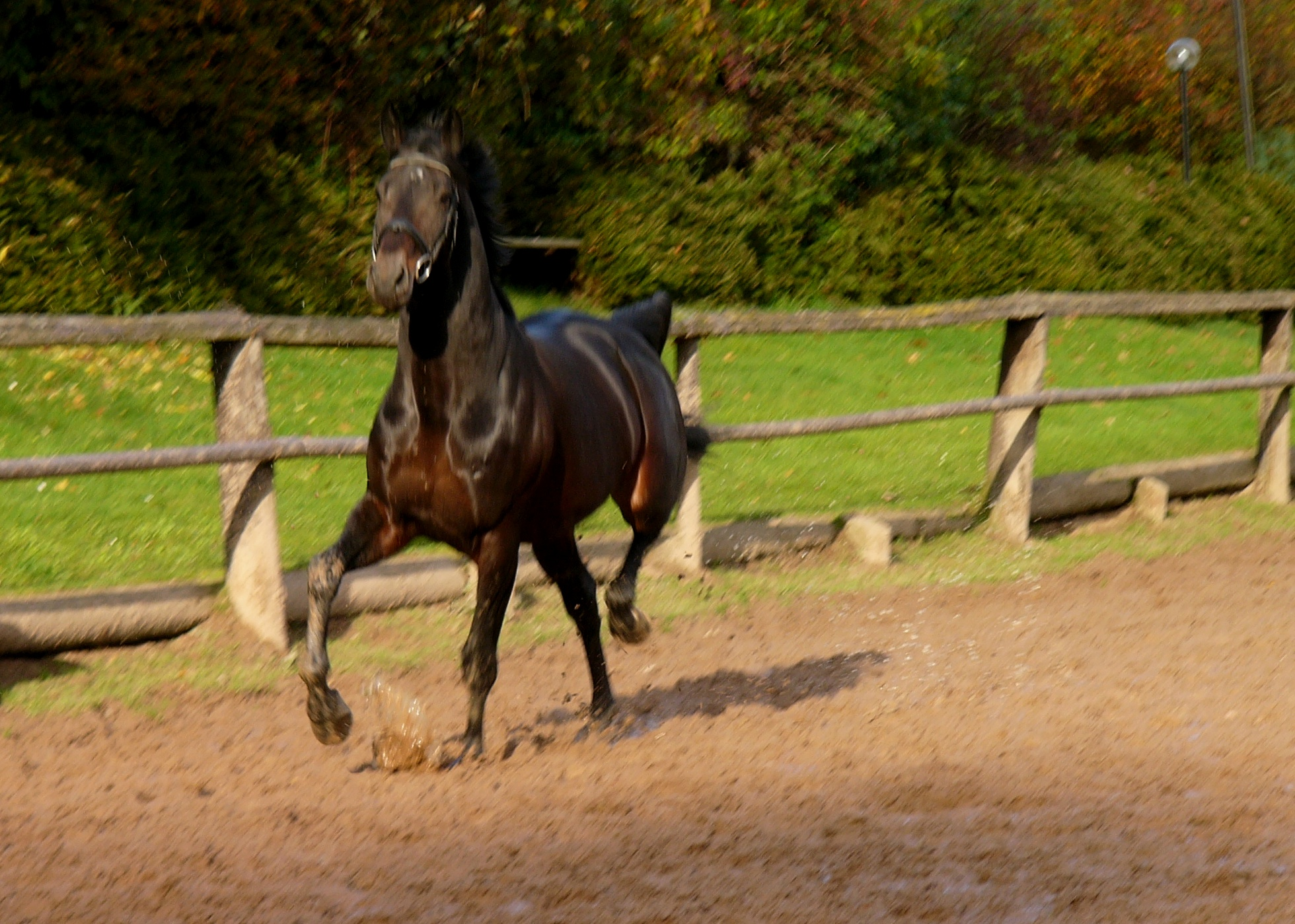 Trakehner